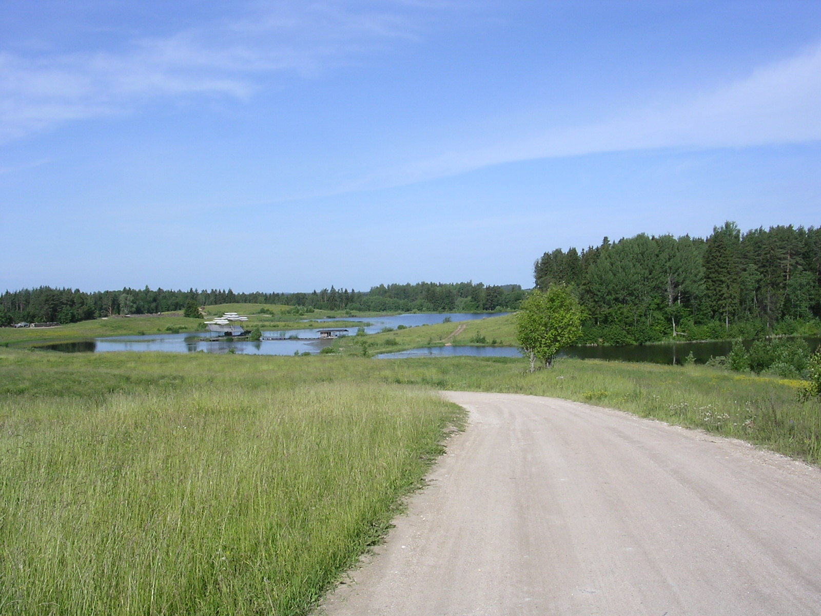 Leigo järved